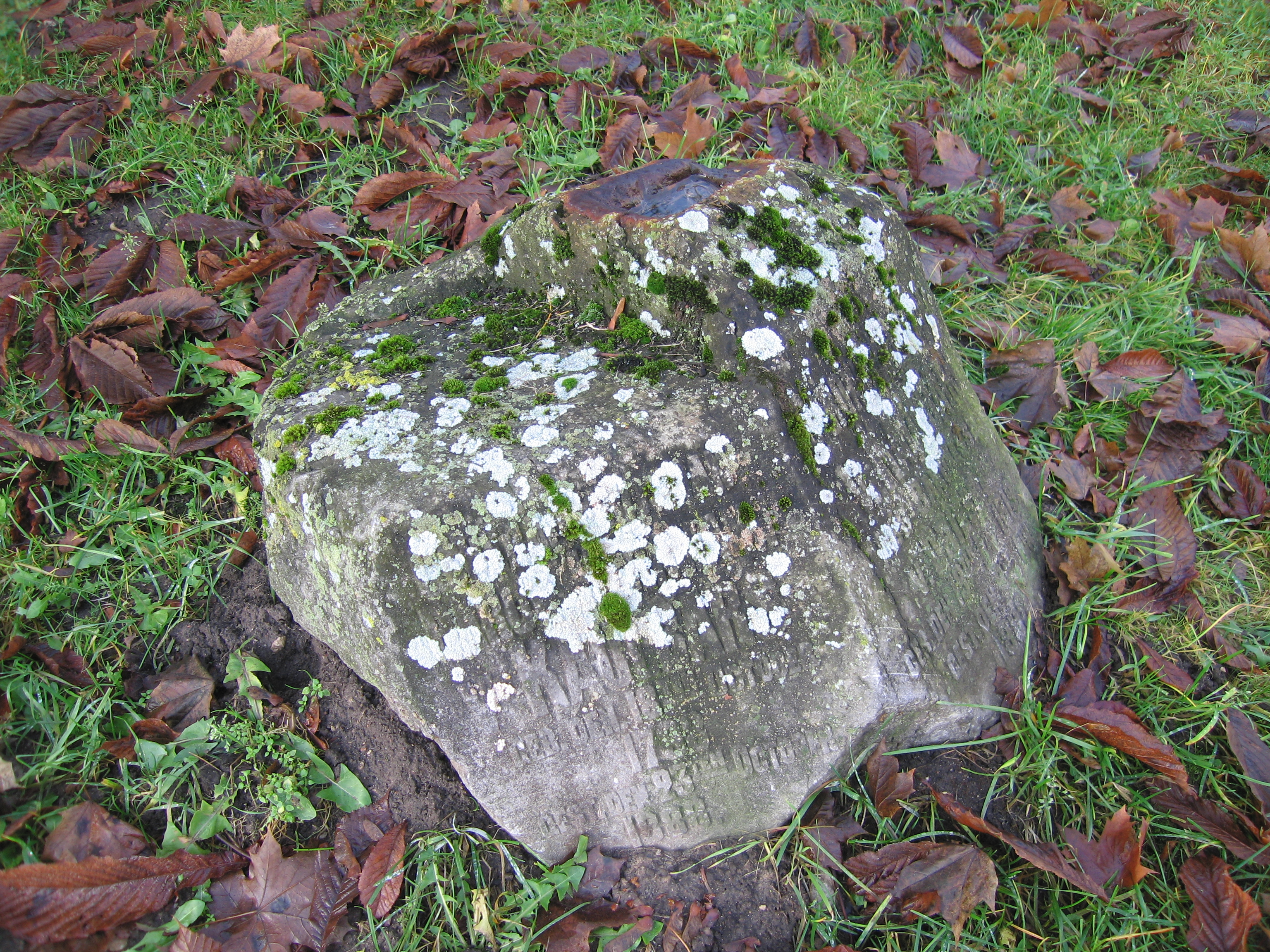 Kalmistult pärinev hauatähis Rägavere mõisa peahoone ees